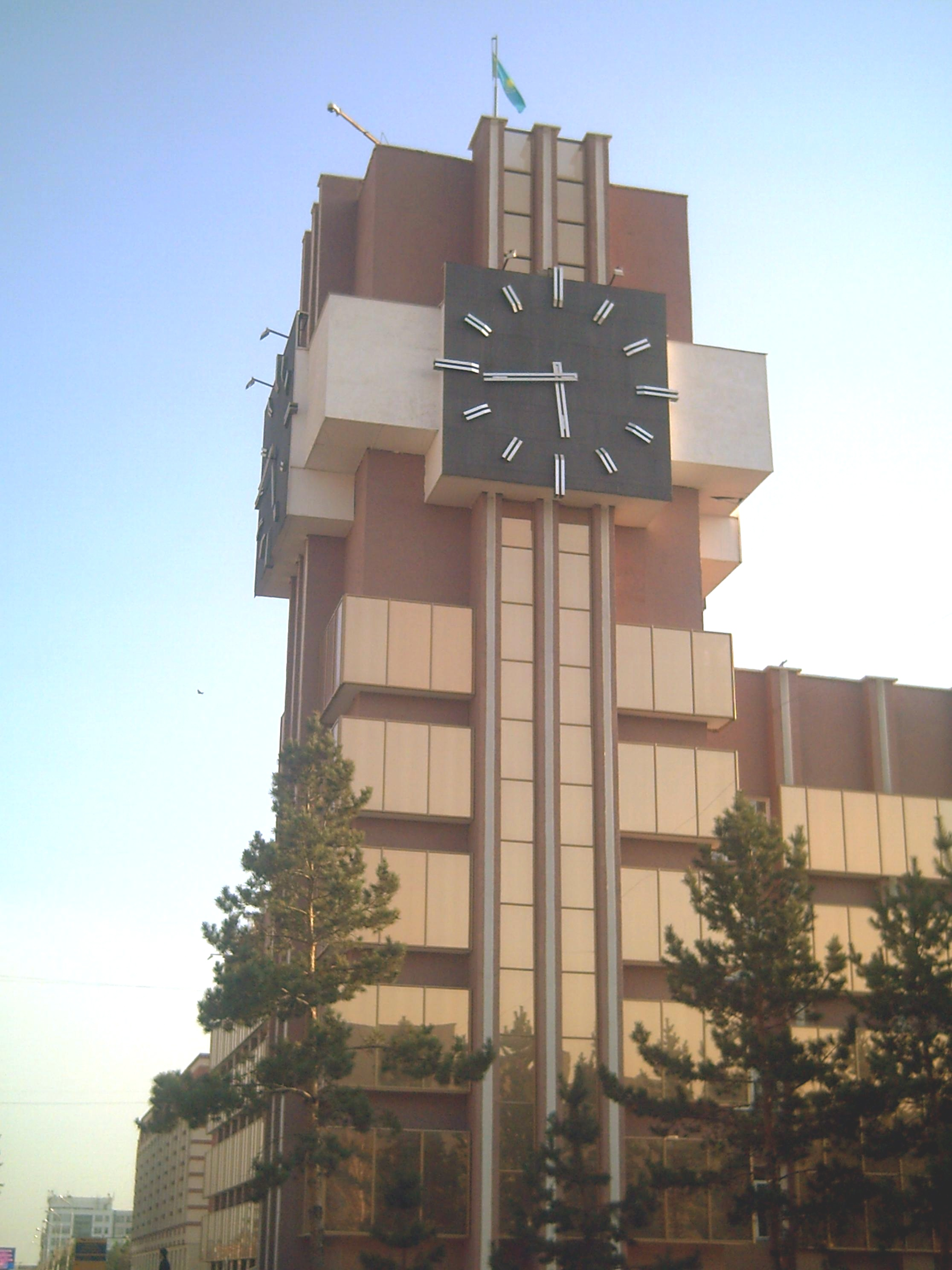 Здание центрального почтамта. Апрель, 2012 года.